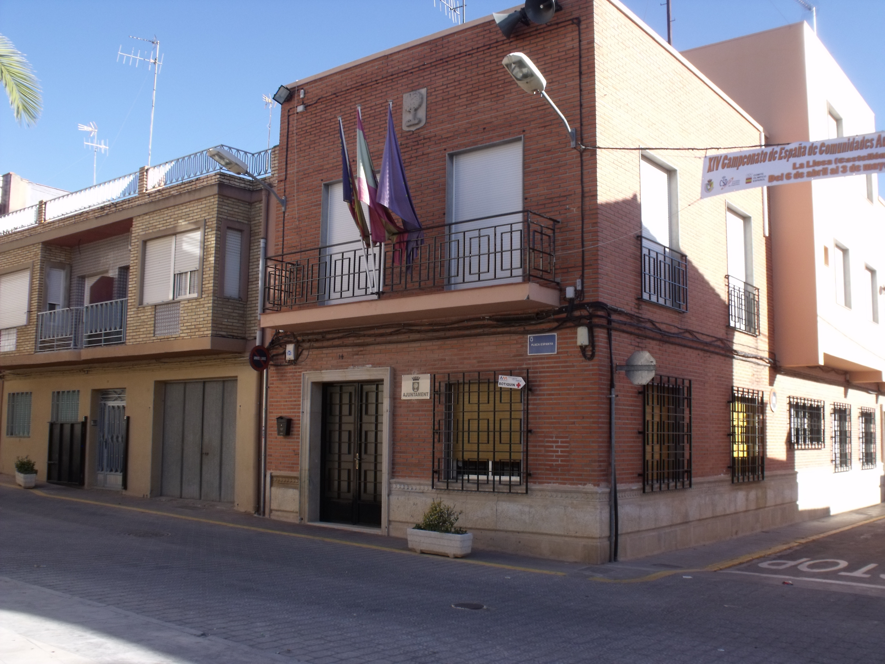 Ajuntament en la Plaça d'Espanya, La Llosa